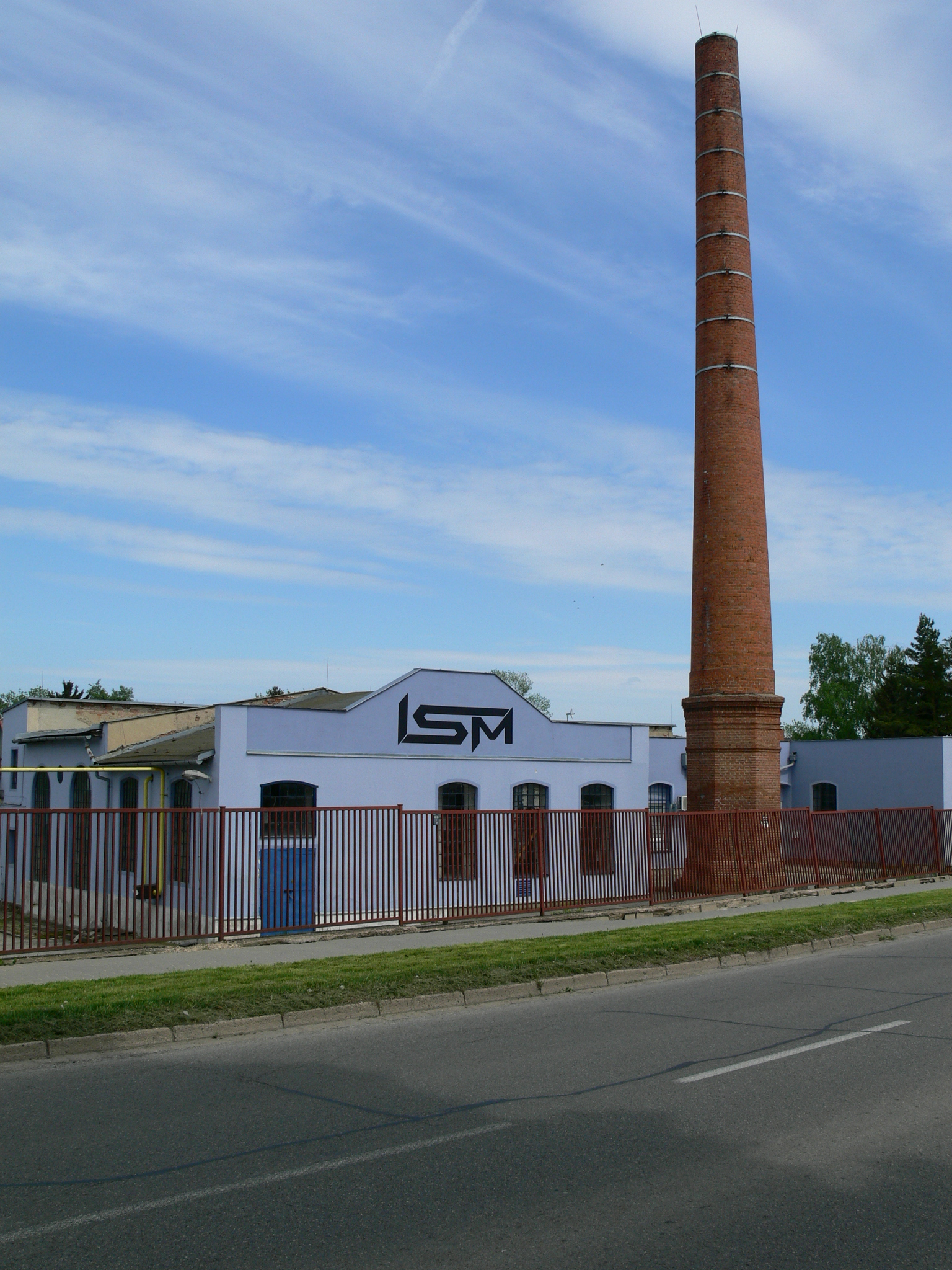 Dědice, Dědická, budova bývalého UP